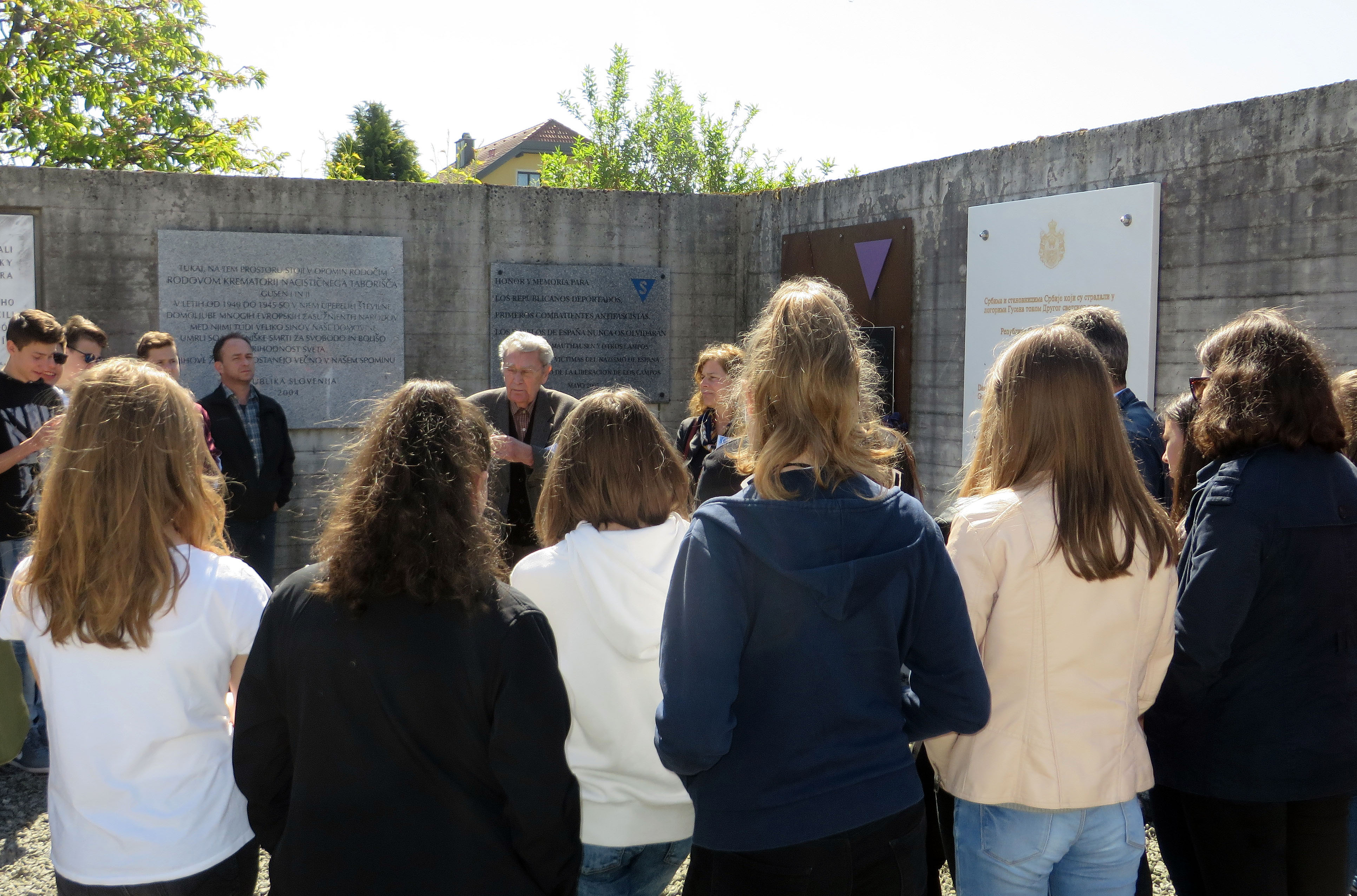 Dušan Stefančič und Jugendliche im KZ Gusen I 2017